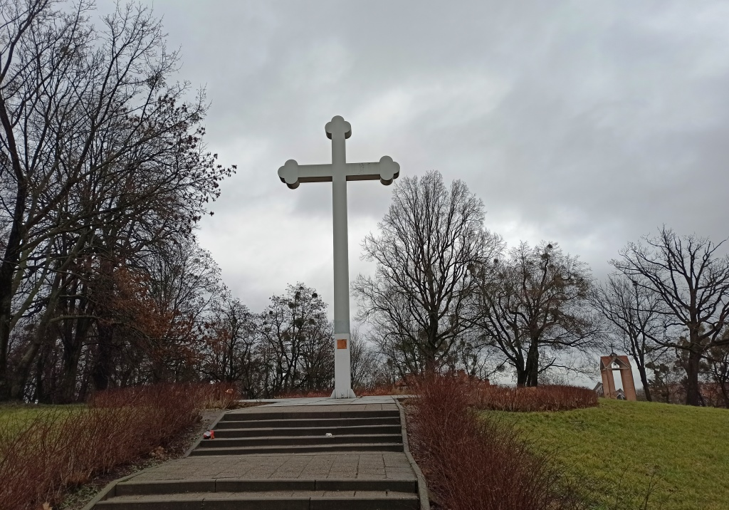 Miejsce nieistniejącego kościoła św. Anny w Elblągu